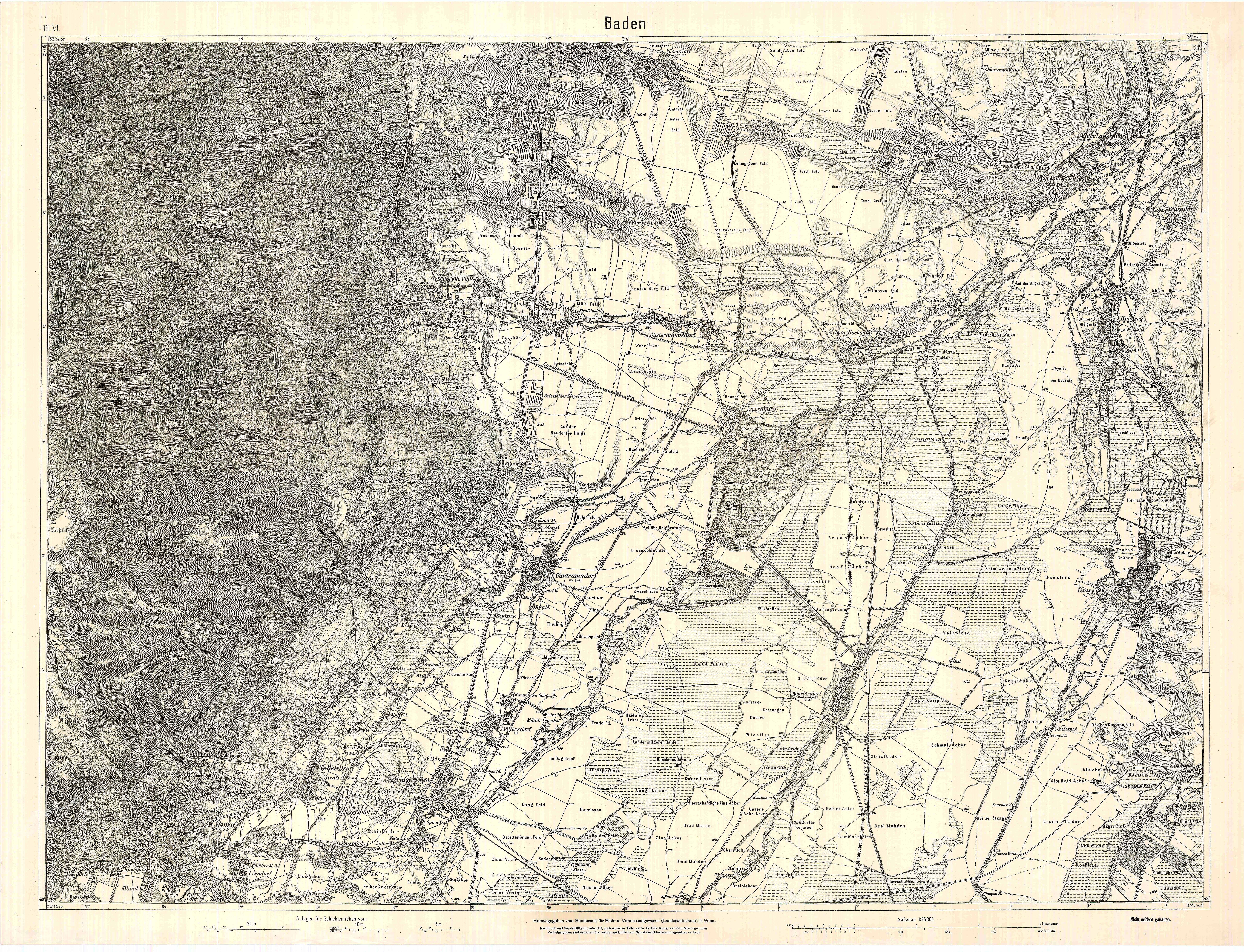 historische Landkarte 1:25.000. Umgebung von Mödling und Himberg im Süden von Wien, kleinere abgemagerte Dateiversion